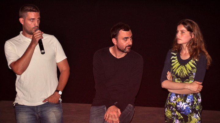 Pascal Sid, Julien Lacombe et Laetitia Casta à l'avant-première de Derrière les murs